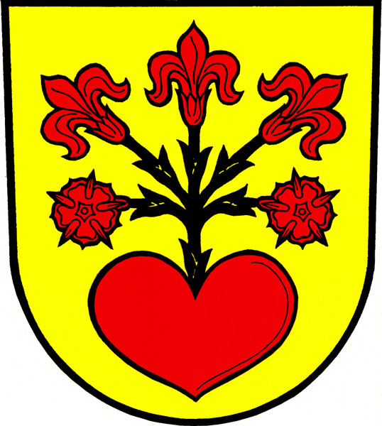 Znak obce Uhelná